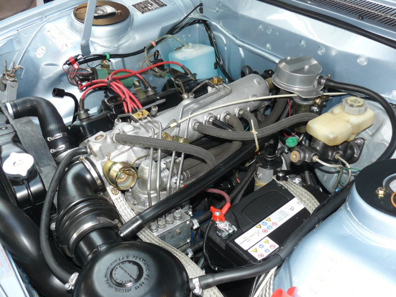 Reims 2014